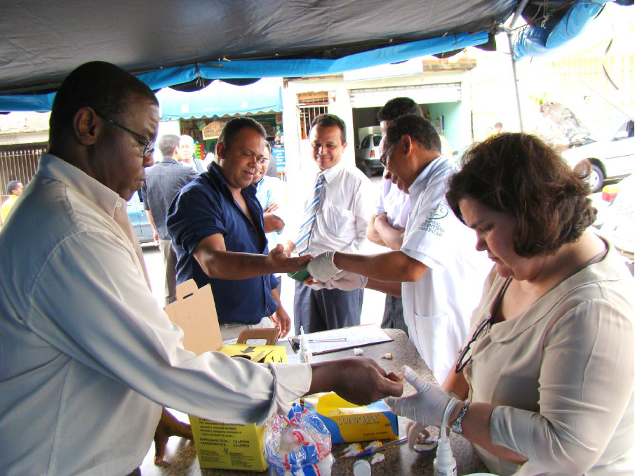 Programa HASP vai à Comunidade, nesse programa o Hospital Adventista de São Paulo reune profissionais da área da saude, de forma voluntária para prestar atendimento a diversas áreas de atendimento hospitalar para a comunidade de forma gratuíta.